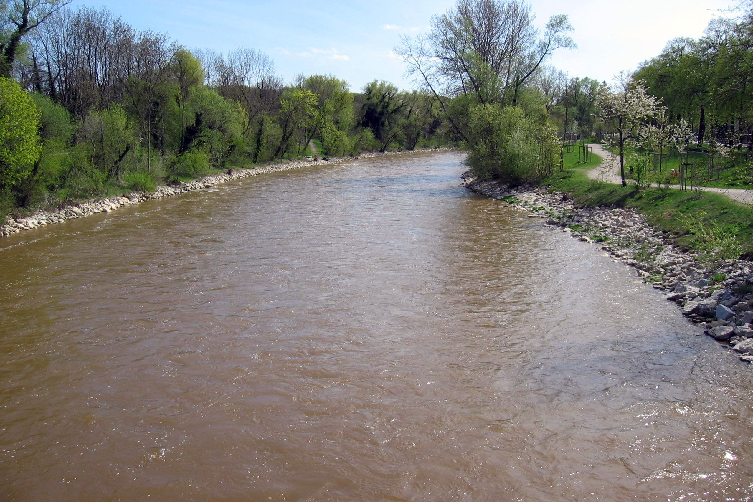 Zu sehen ist der Fluss Wertach in Augsburg.